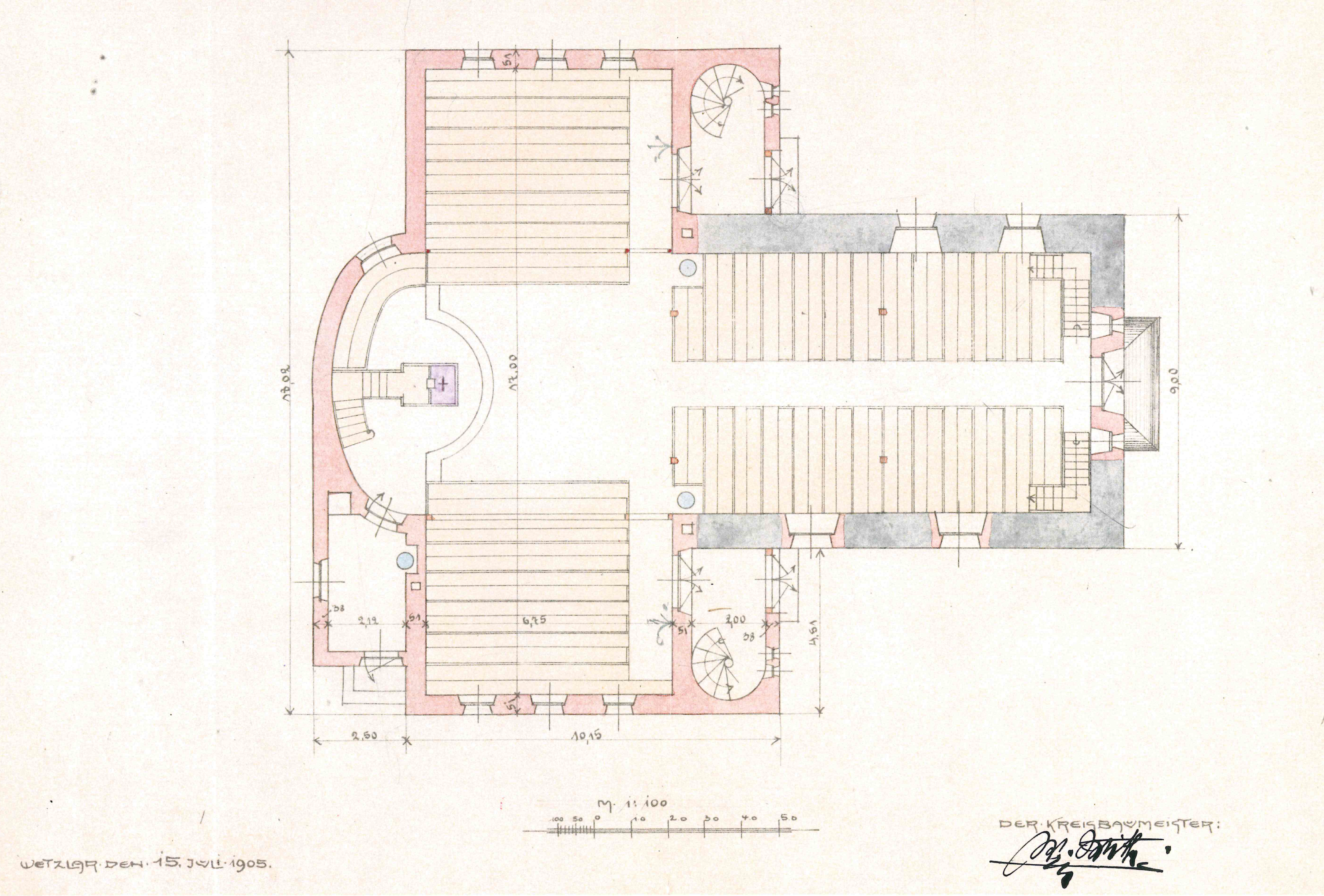 Grundriss der Evangelischen Kirche Hochelheim, Hüttenberg, Lahn-Dill-Kreis, Hessen, Deutschland